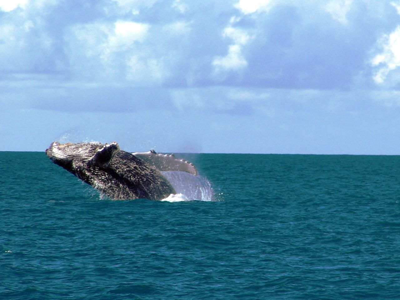 Jubartes em Abrolhos, Porto Seguro, Bahia, Brasil.Balé da Jubarte